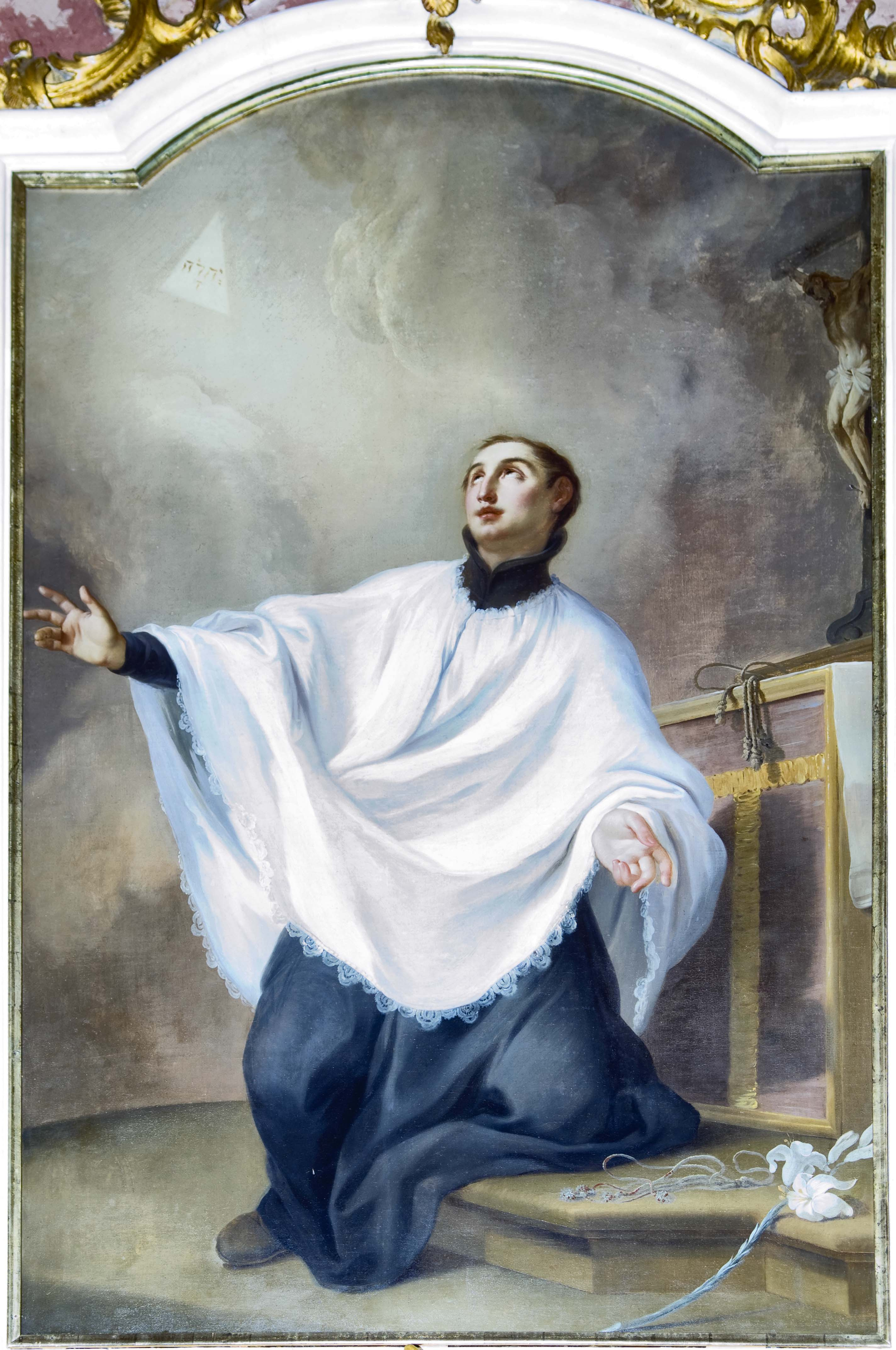 St. Aloysius am Altar knieend